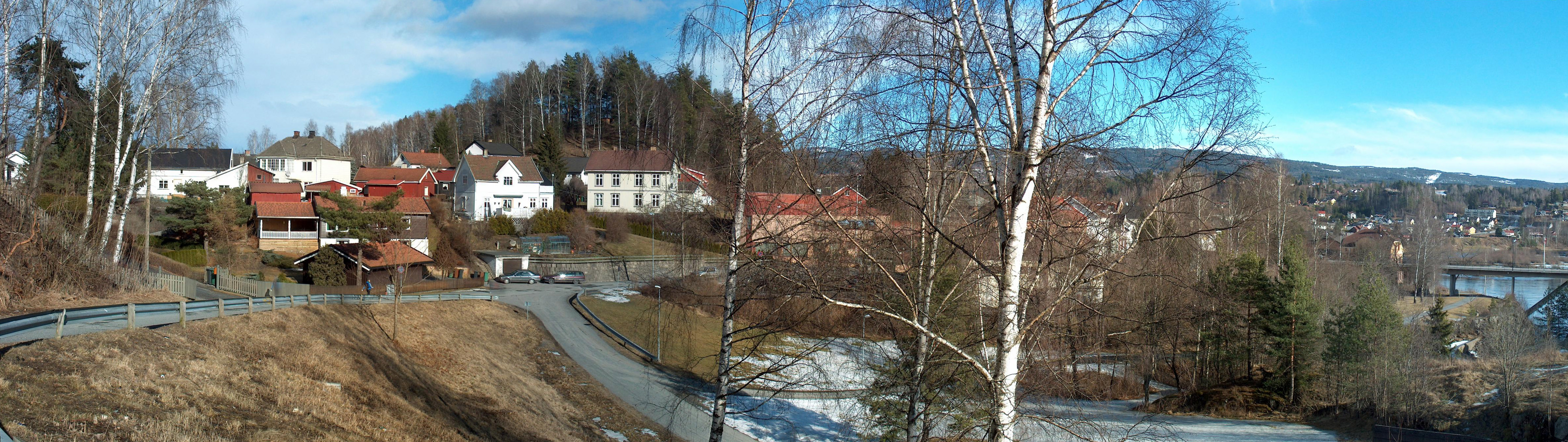 Panorama over Nordsiden i Hønefoss, med Hellebaken, Blybergshaugen og i bakgrunnen St. Hanshaugen.